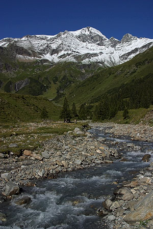 Piz Sardona und die Tamina (Calfeisental)